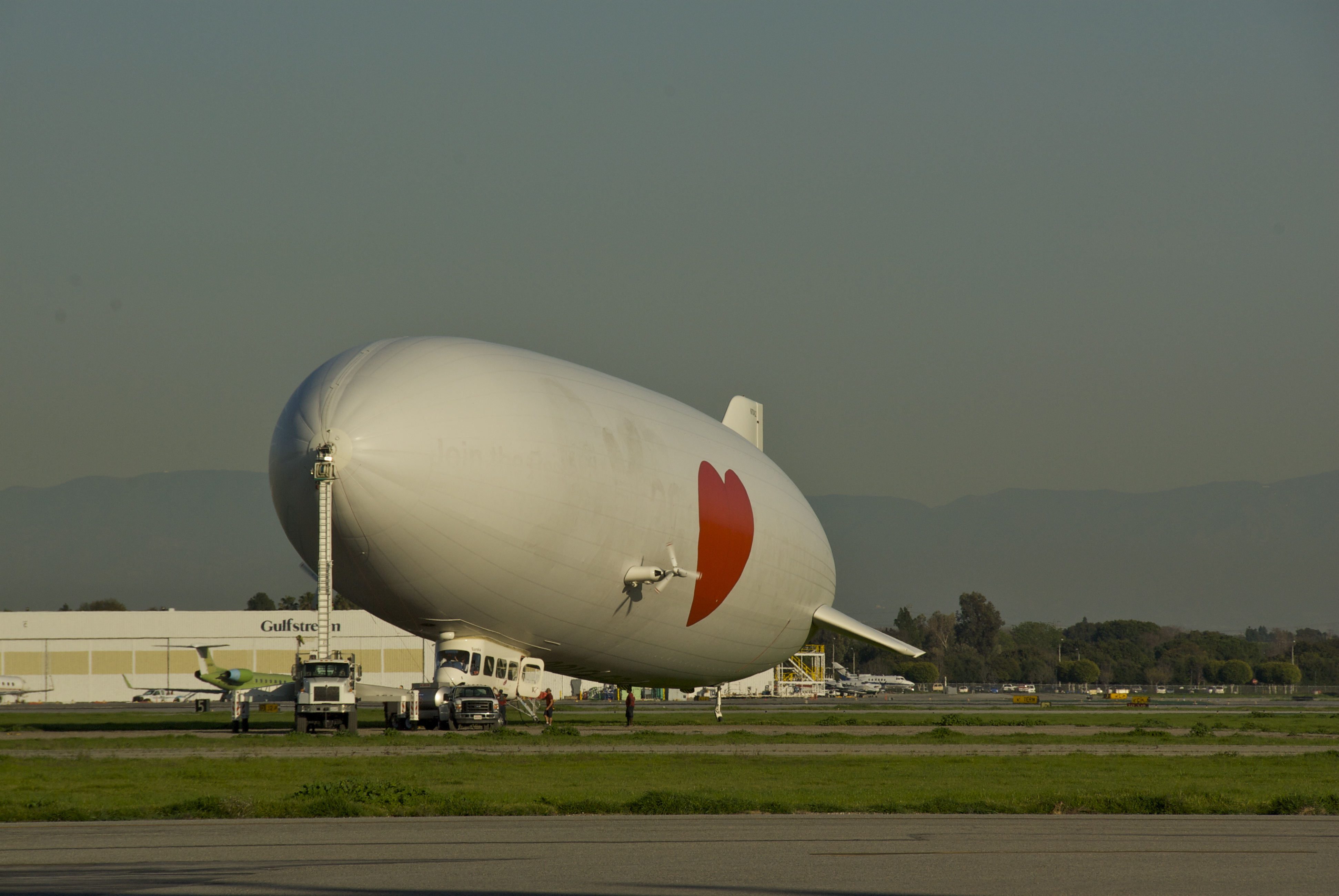 Zeppelin Eureka, don't call me a blimp!